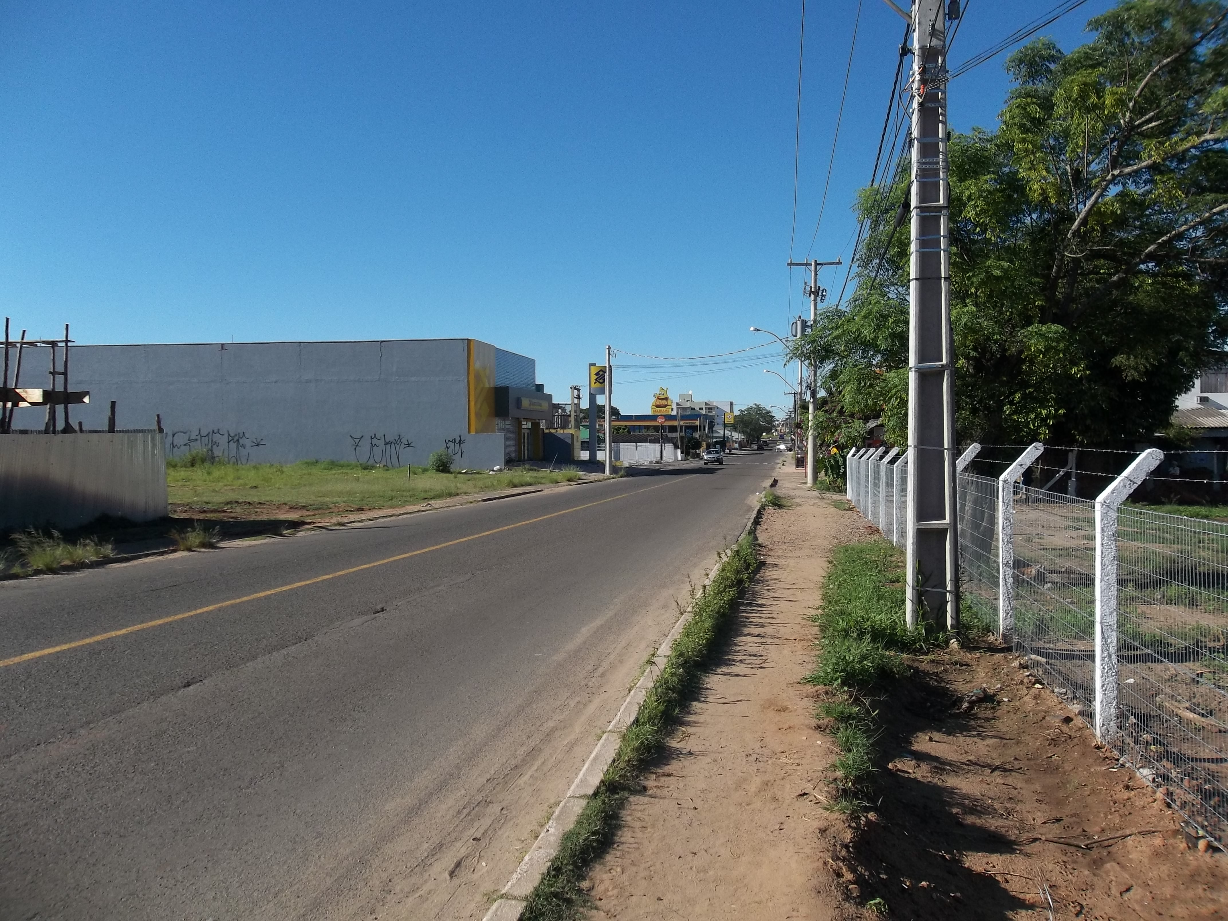 Rua Maranhão. Pinheiro Machado, Sede, Santa Maria, Rio Grande do Sul, Brasil.